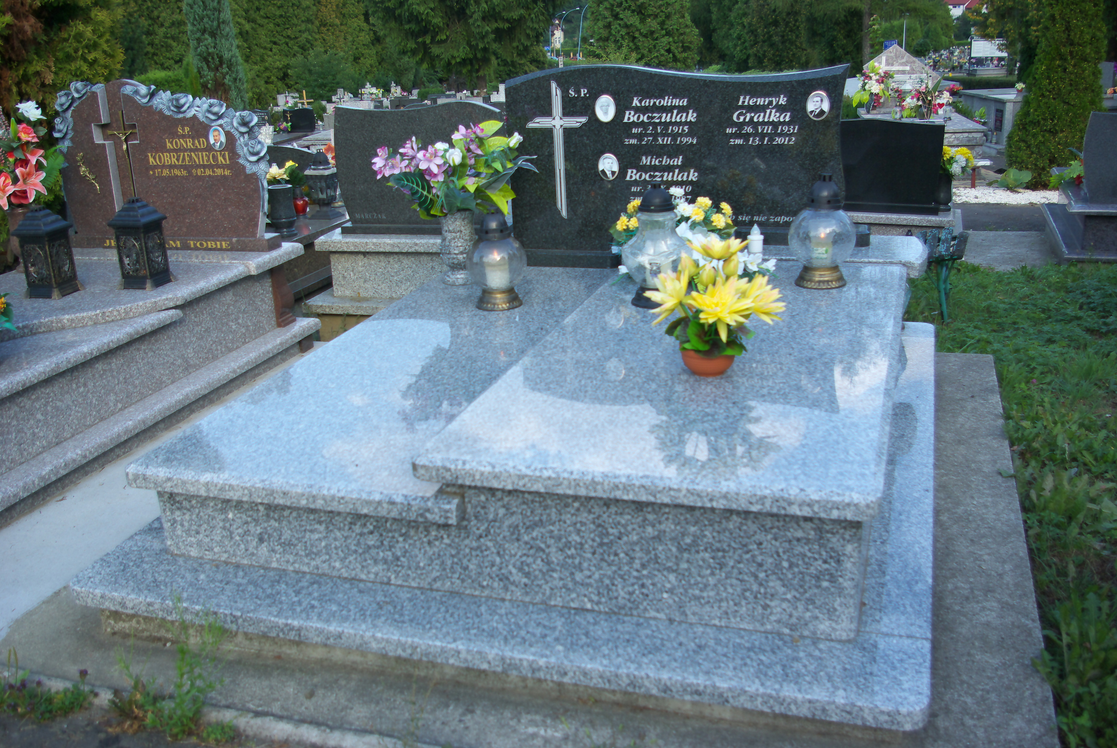 Grobowiec rodziny Boczulaków na Cmentarzu Centralnym w Sanoku. Pochowany Henryk Gralka.